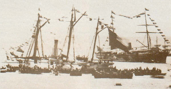 Goleta "Covadonga" capturada a España Fotografía del Museo Naval del Perú, Callao, licenciada para su uso en Wikipedia bao los términos de . --Ari 04:09 7 mar, 2005 (CET)